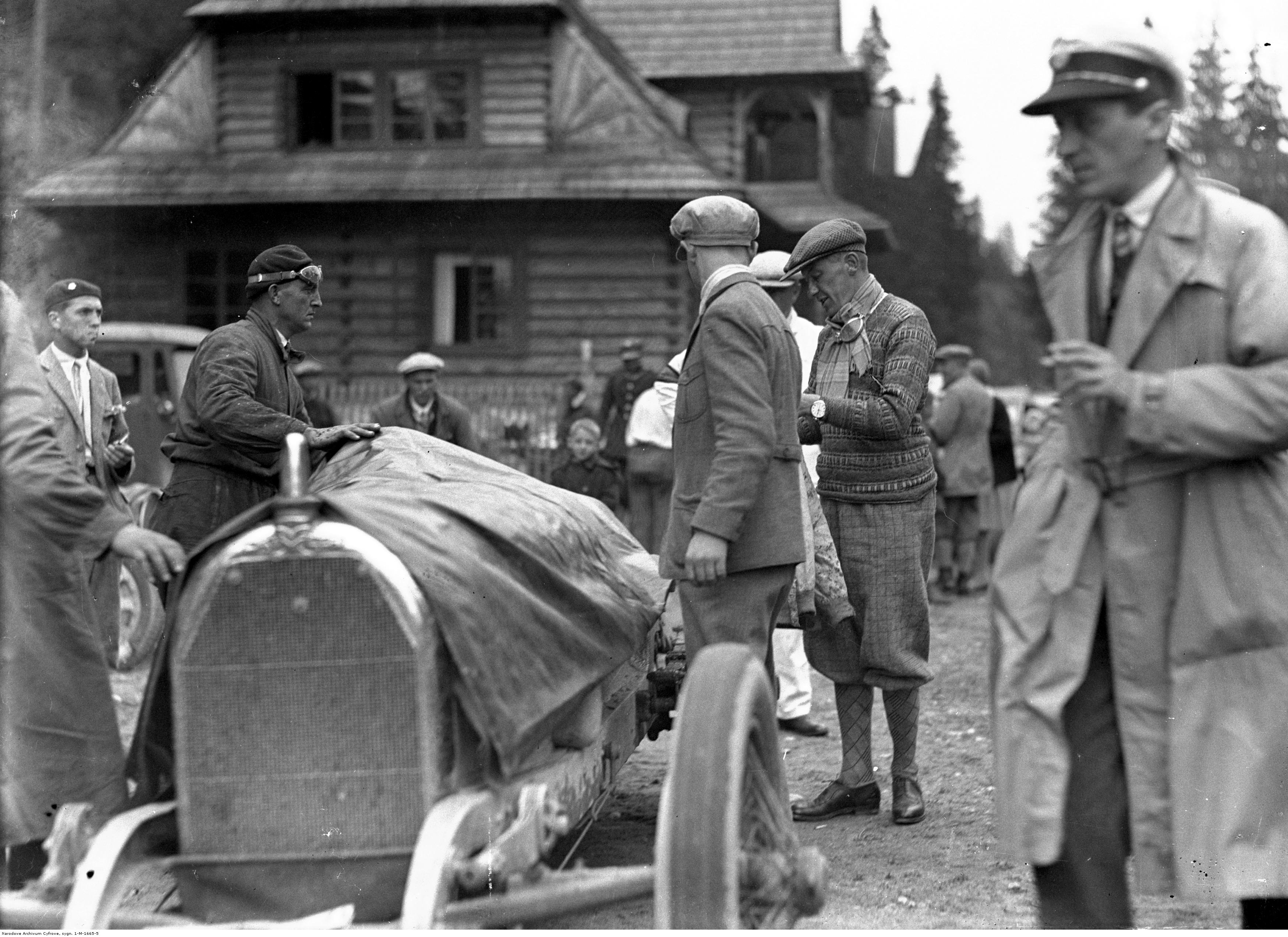 II Międzynarodowy Wyścig Tatrzański w Zakopanem; sierpień 1929 r. Uczestnik wyścigu Henryk Liefeldt przy samochodzie Austro-Daimler. Koncern Ilustrowany Kurier Codzienny - Archiwum Ilustracji. Sygnatura: 1-M-1665-5